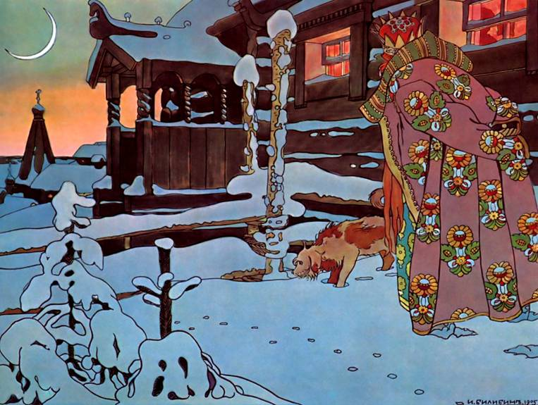 Иллюстрация к «Сказке о царе Салтане»